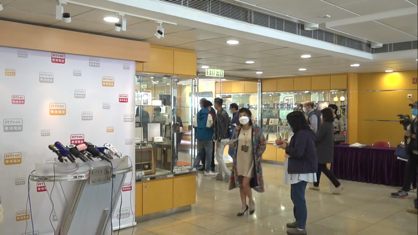 港台顧問委員會主席陳建強與廣播處長梁家榮會面後見傳媒